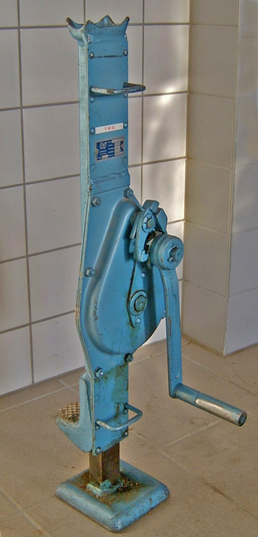 Eng Zännradwann Source: Foto vum Karl Gruber ex de-Wikipedia